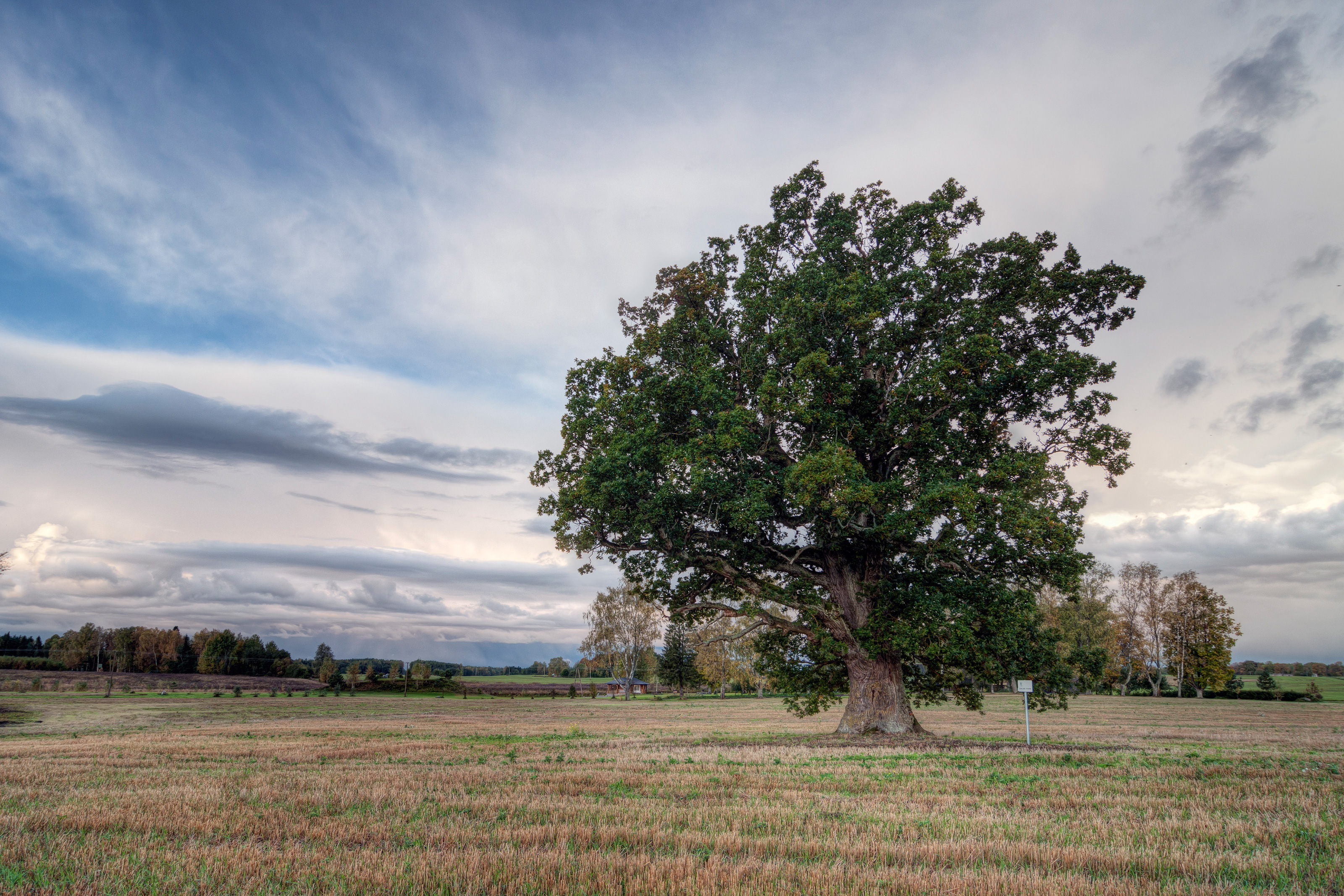 Salve tamm 2009 sügisel